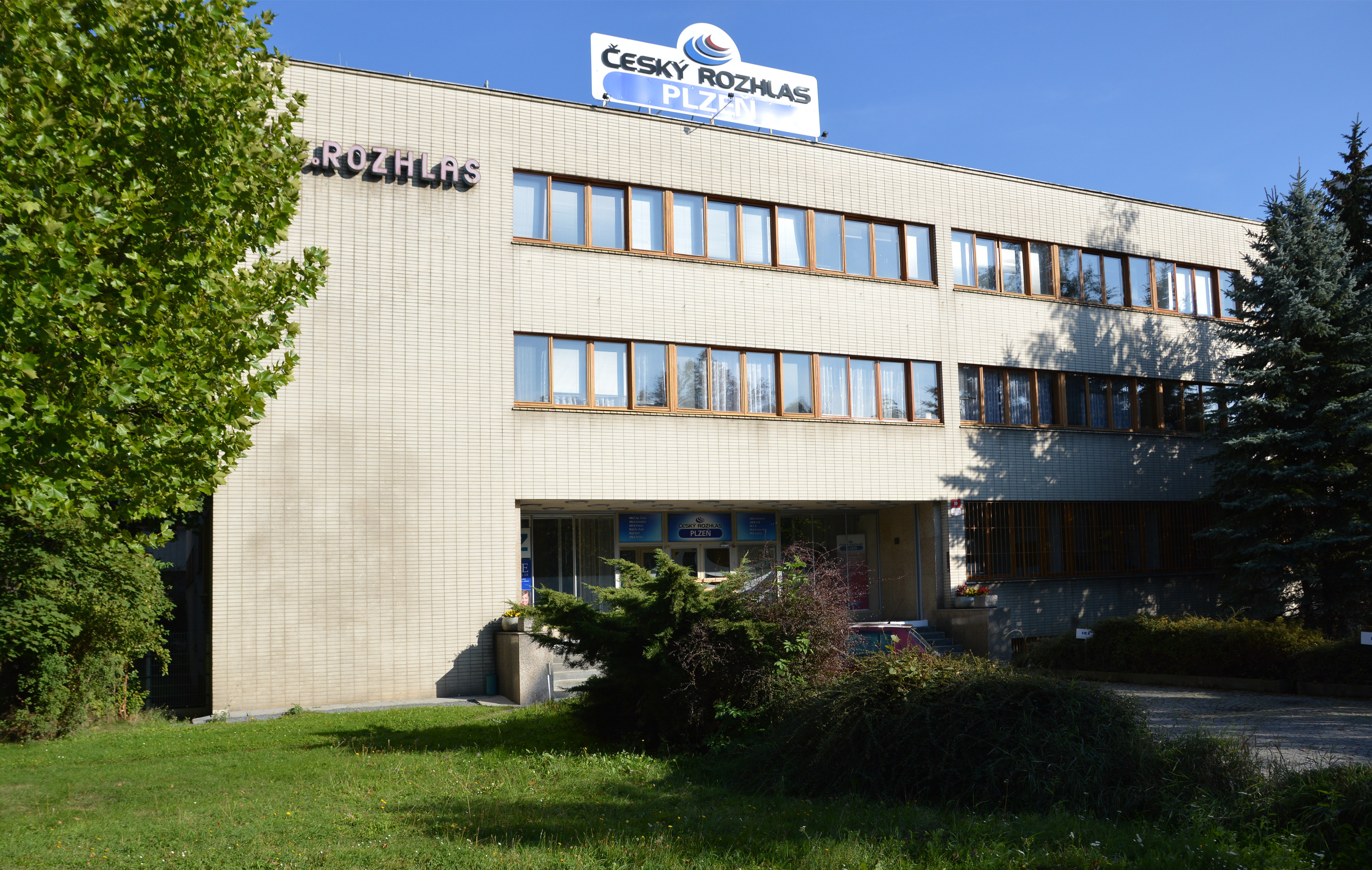 Rozhlas (Plzeň), nám. Míru 2363/10, Plzeň